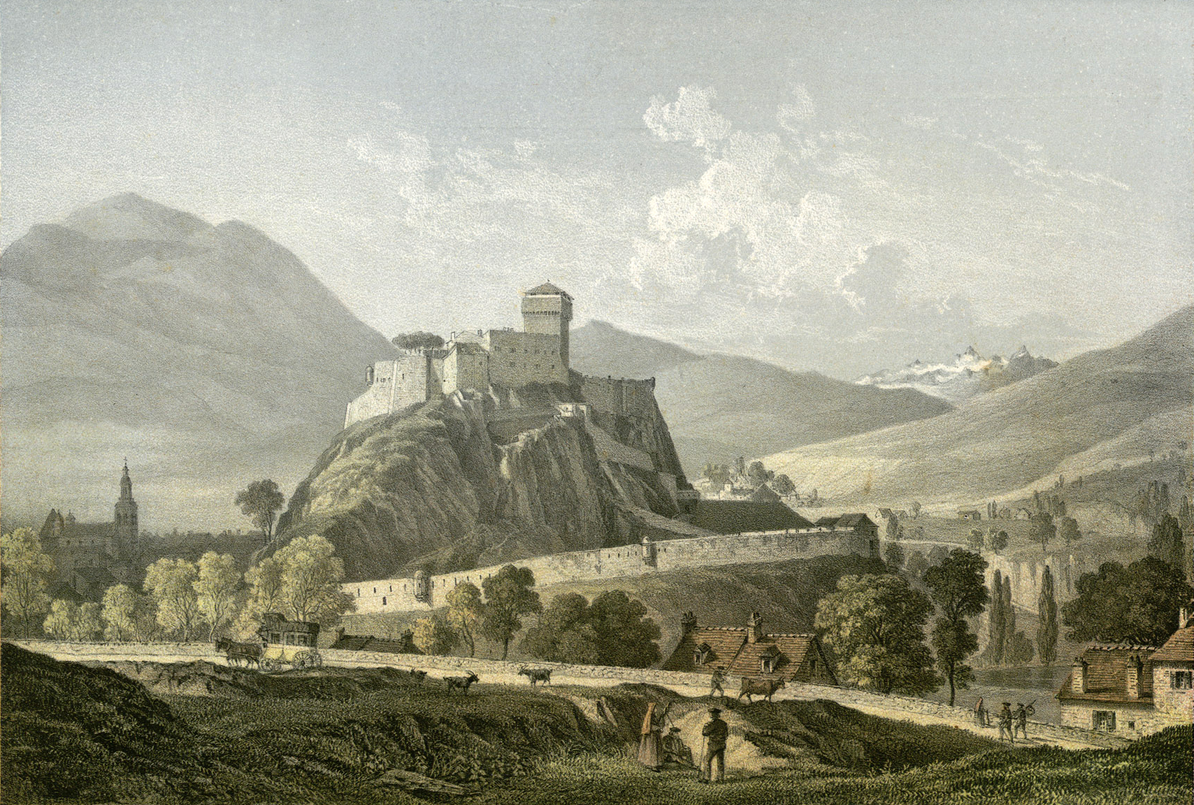 Château fort de Lourdes, Haute Pyrénées, lithographie en couleurs, Bibliothèque Municipale de Toulouse, domaine public. Fait partie d'un ensemble de 475 de lithographies intitulé "La France de nos jours" et publié entre 1853 et 1876